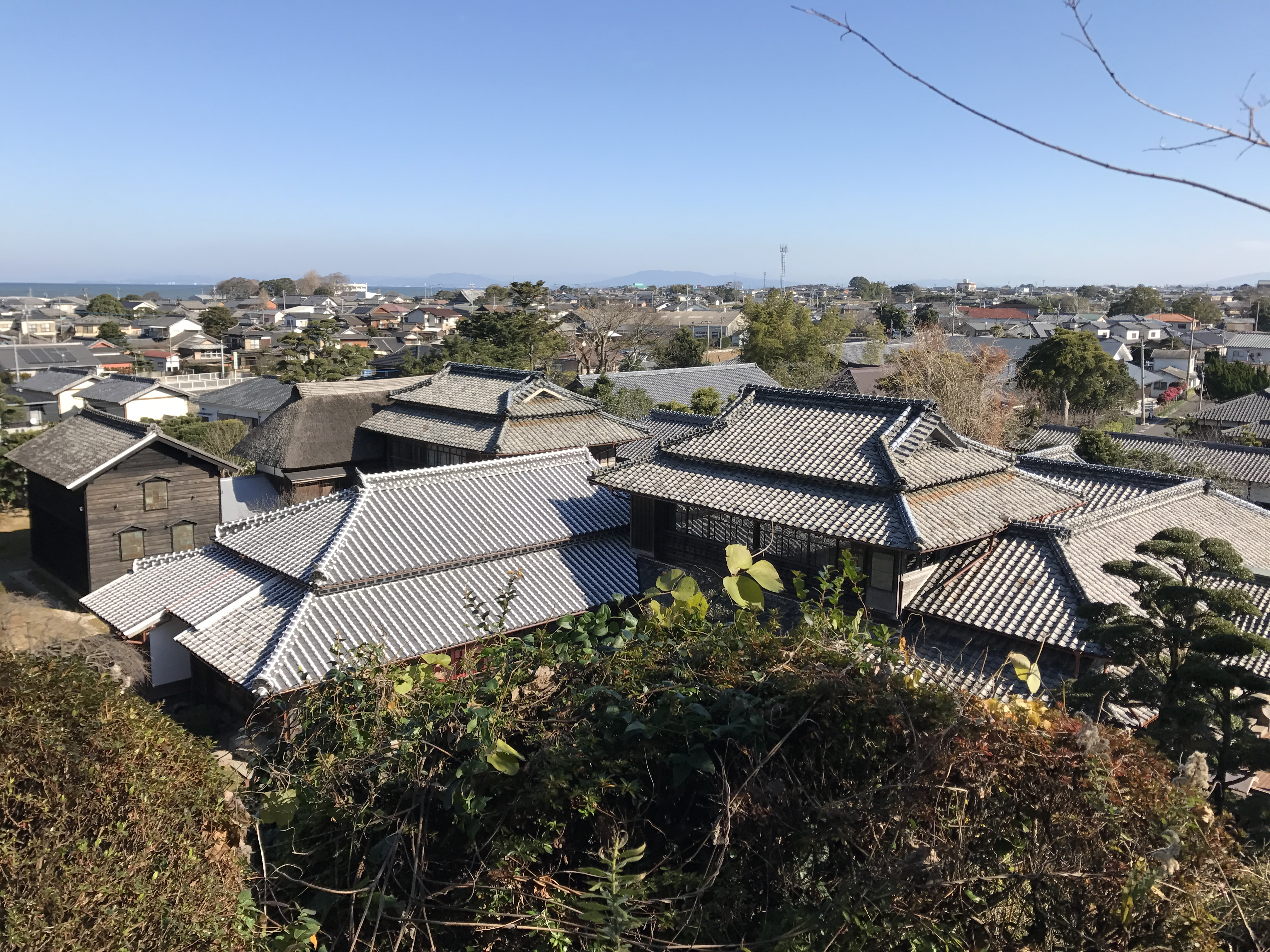 国見神代小路歴史文化公園鍋島邸(旧鍋島家住宅)の庭園より望む屋敷の全景